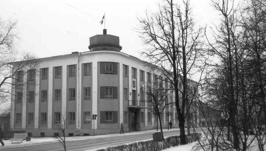 "Võru Maavalitsus" i Estland, januari 1995. Bilden är fotograferad av Harri Blomberg.